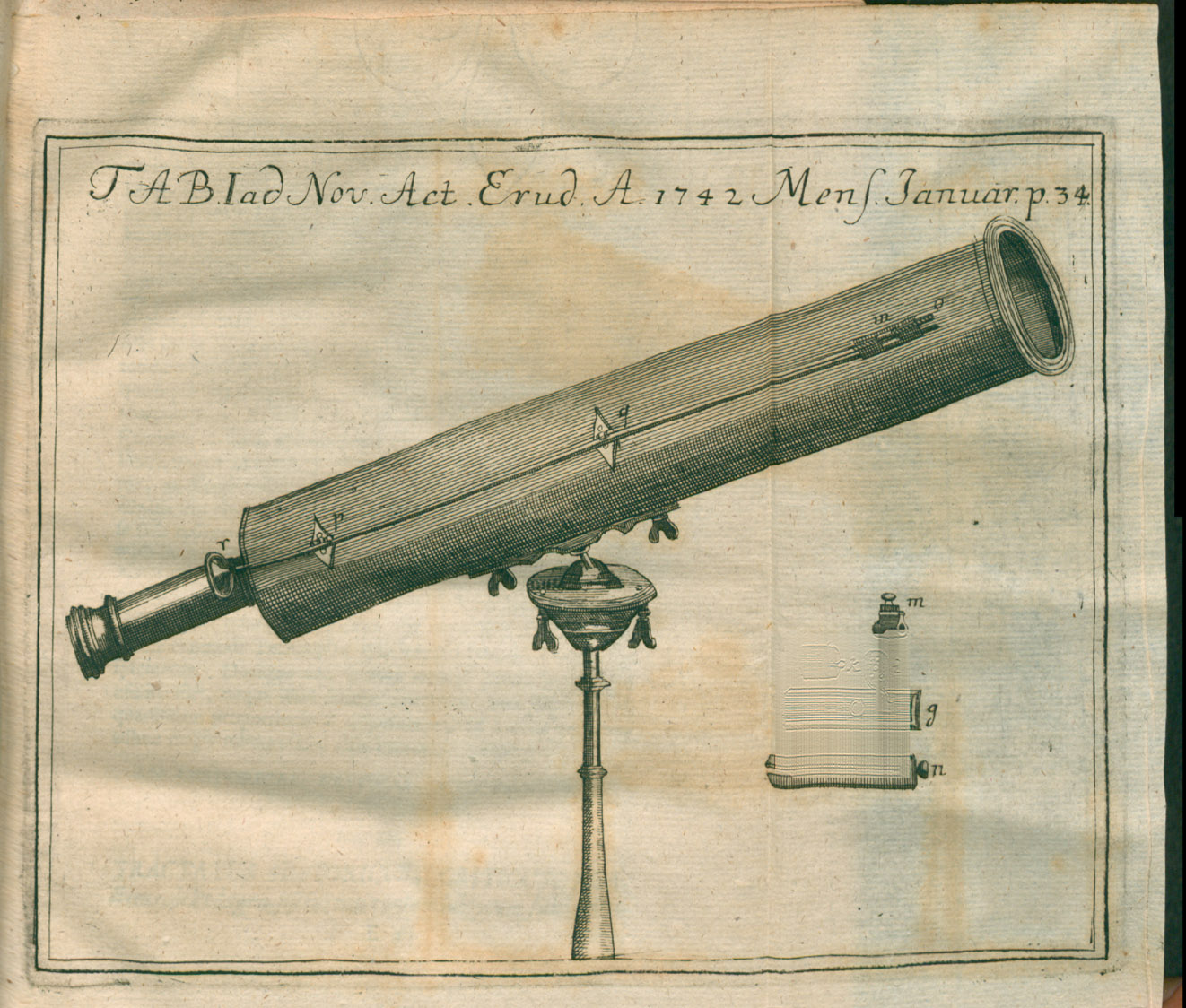 Illustration